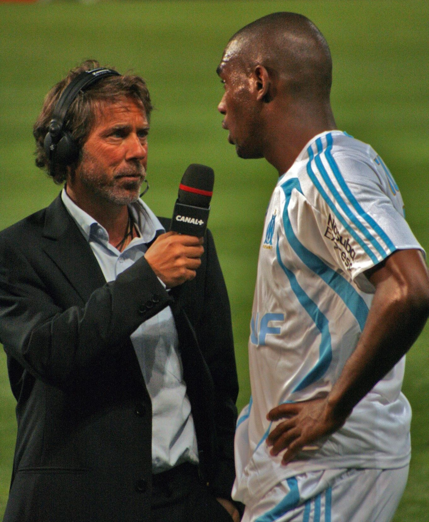 Olympique de Marseille - Girondins de Bordeaux Ronald Zubar, Laurent Paganelli au micro, saison 2007-2008